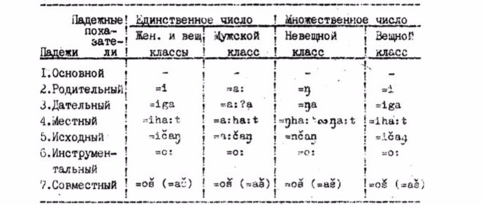 М.А.Кастрен